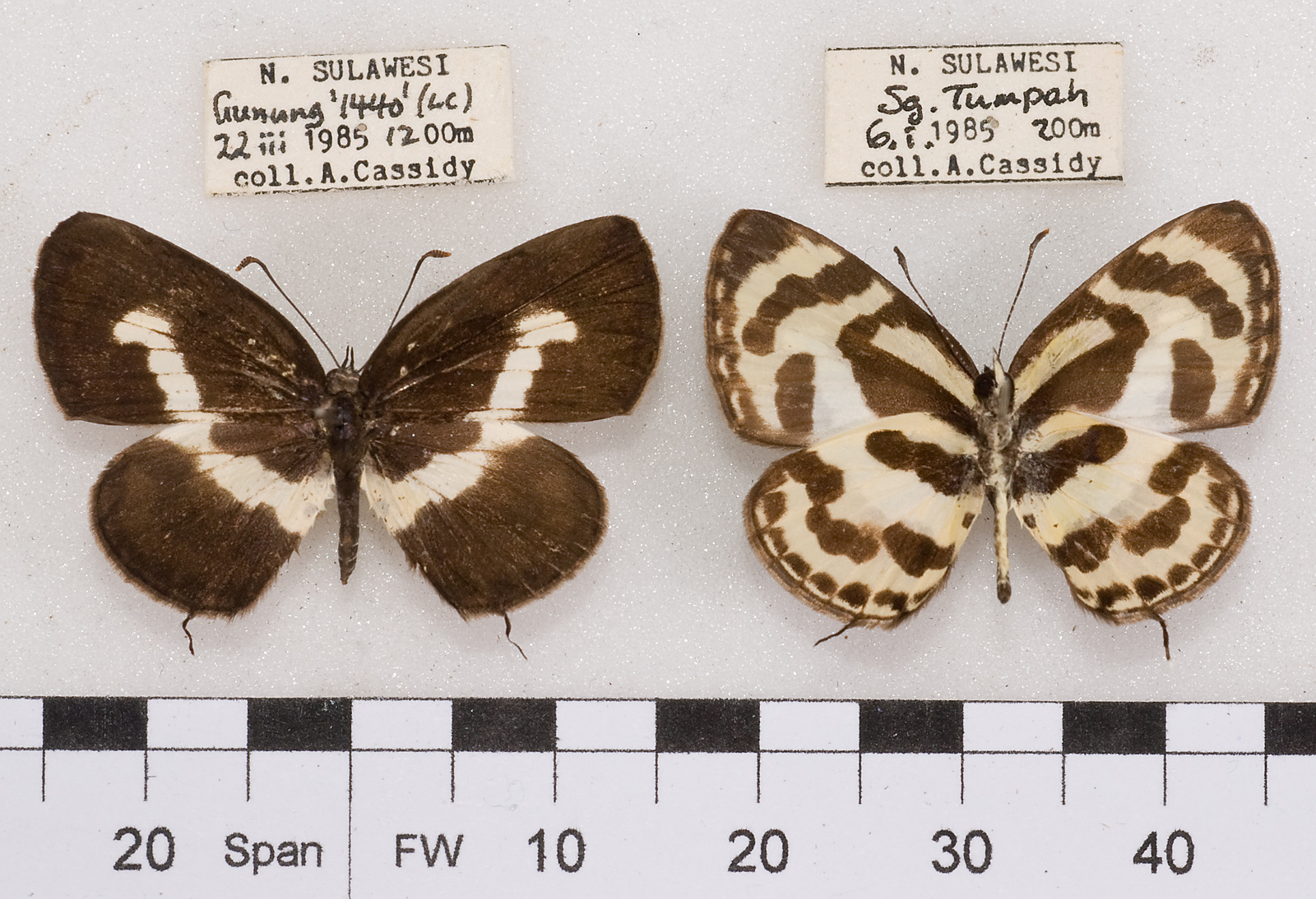 Caleta caleta caleat, males, set specimens, Sulawesi, Alan Cassidy photo